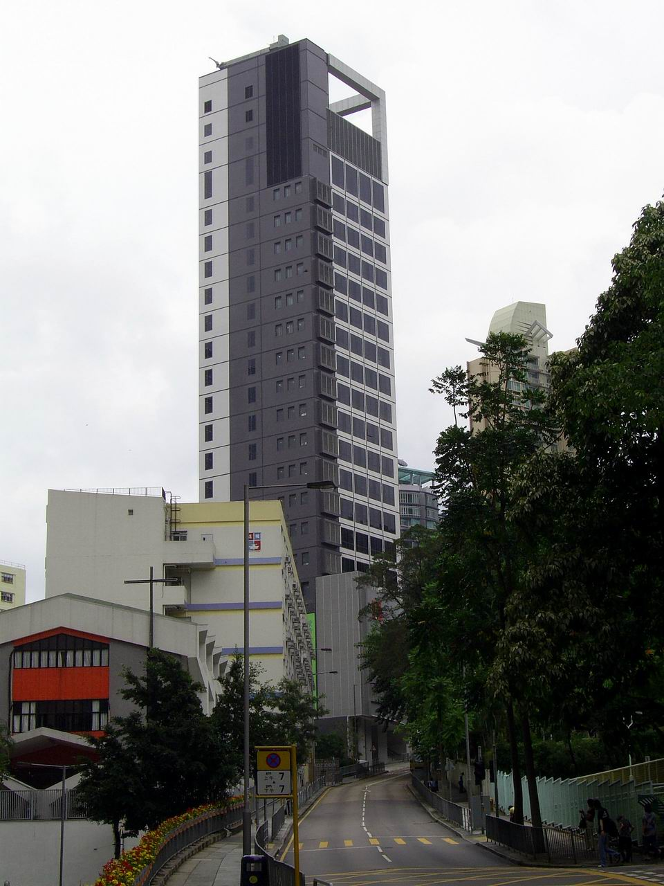 中文（香港）: 北角百福道香港青年協會大廈